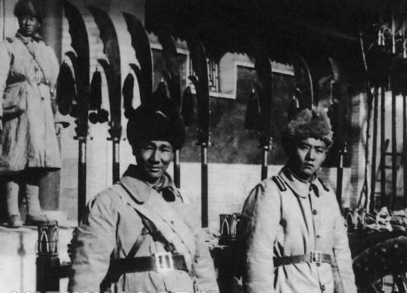 防寒帽を被った奉天派の将兵ら。